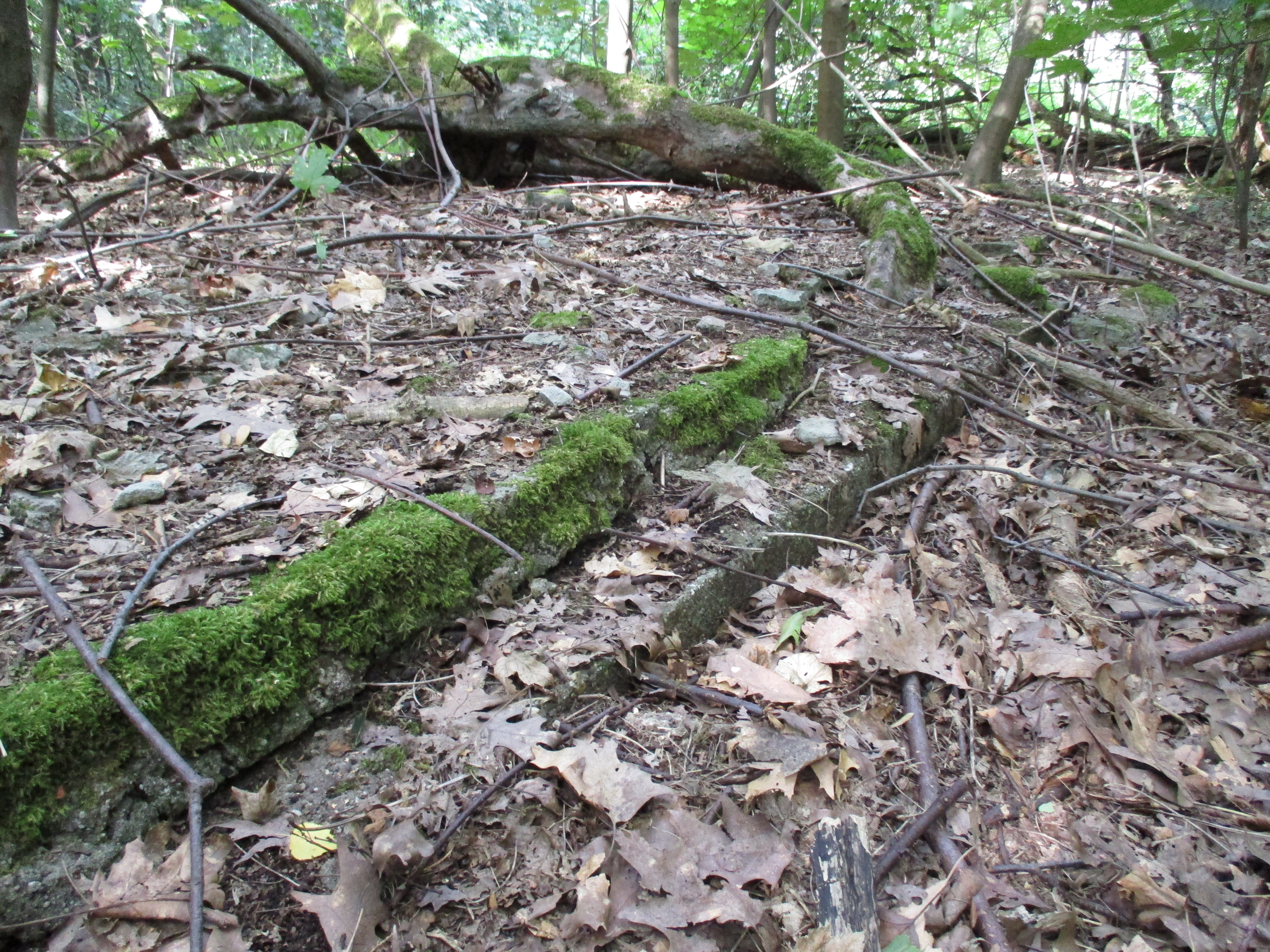 Panzerbau III war eine Rüstungsschmiede der Firma Krupp während dem 2. Weltkrieg in Essen-Borbeck. Dort wurden Zulieferteile für den Tigerpanzer gefertigt. Heute befindet sich auf der Fläche ein kleines Naherholungsgebiet. Hier und da entdeckt man heute noch Fundamentreste der ehemaligen Panzerfabrik.